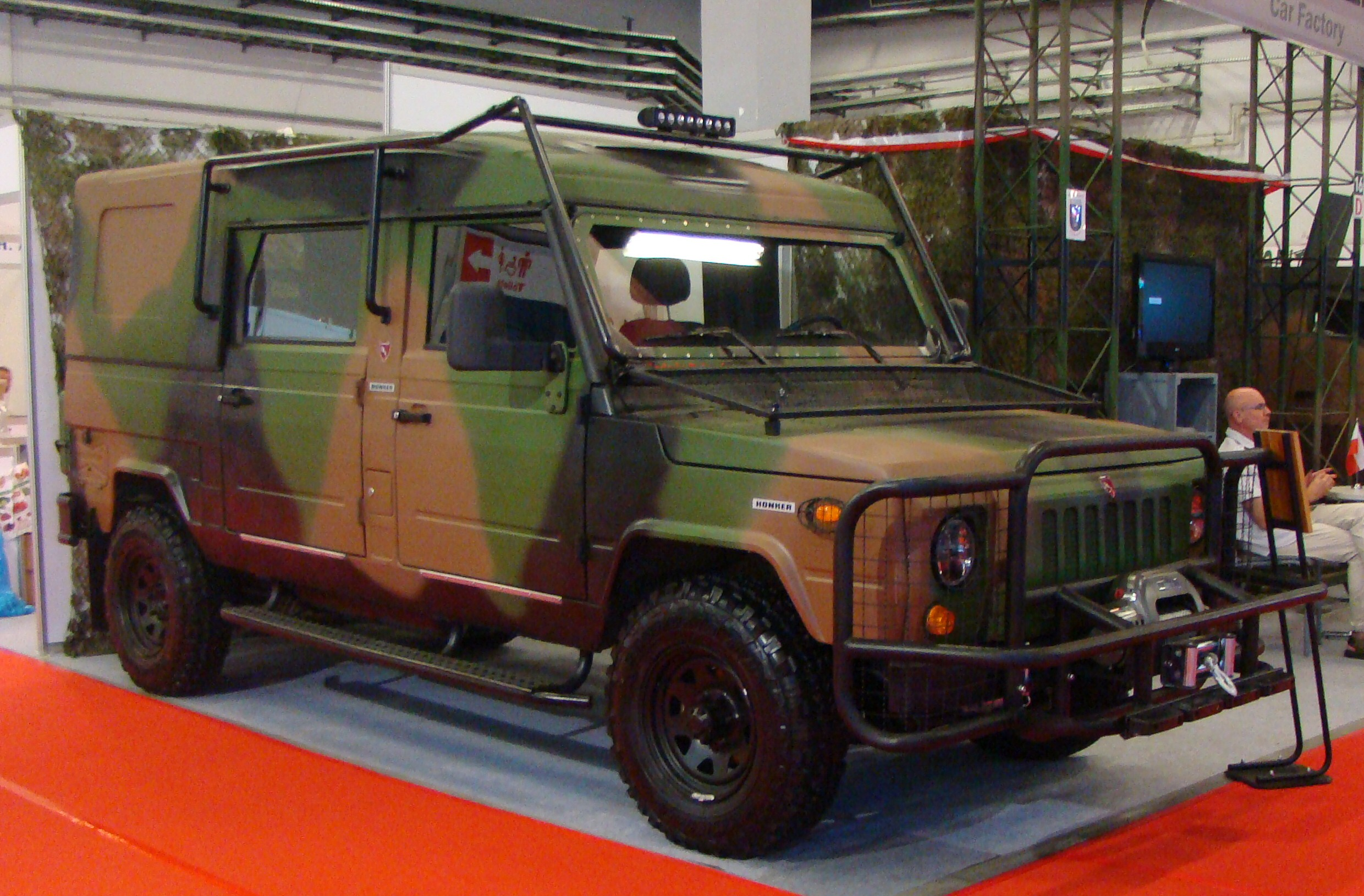 Honker 4x4 Uniwersalny